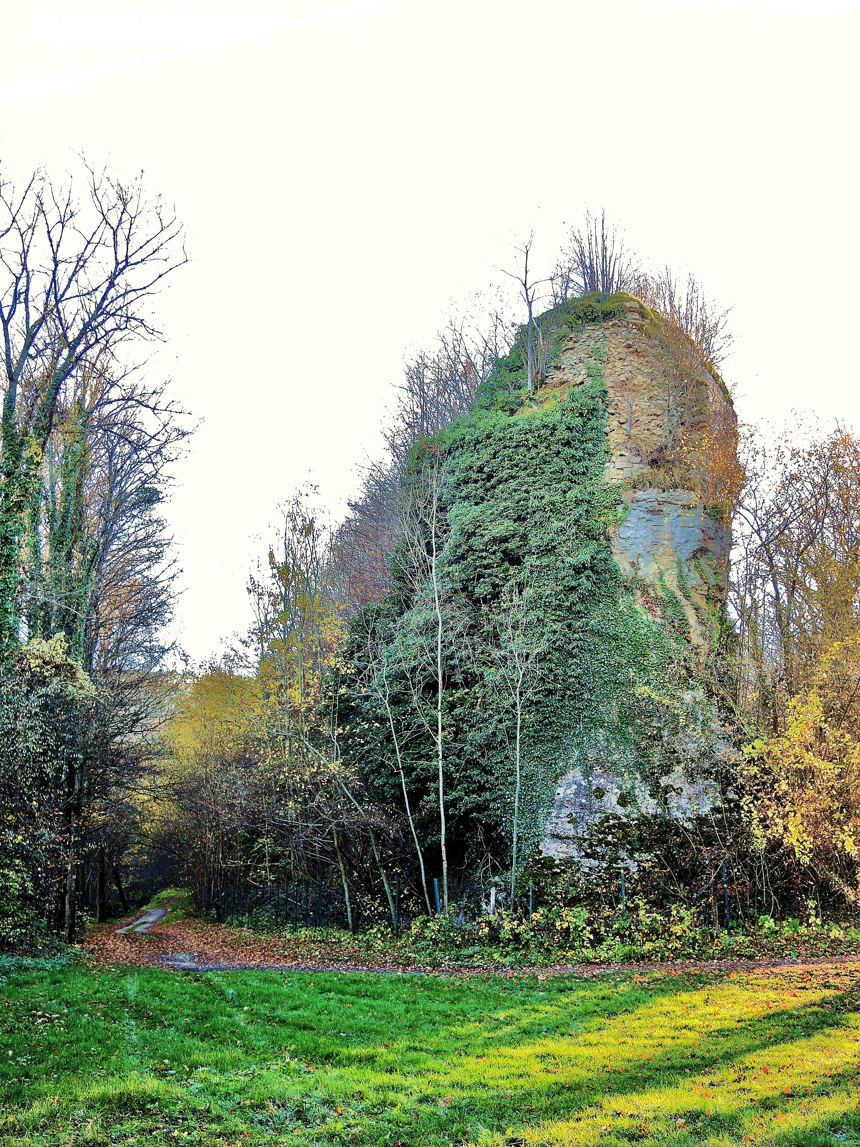 Eperon rocheux surmonté des ruines de la tour Nord de l'ancien château de Neuchâtel-Urtière. Département du Doubs. France.